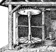 Urządzenie szybu wydobywczego z XIV w.